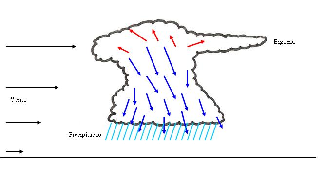 Esquema da de dissipação da nuvem cumulonimbus